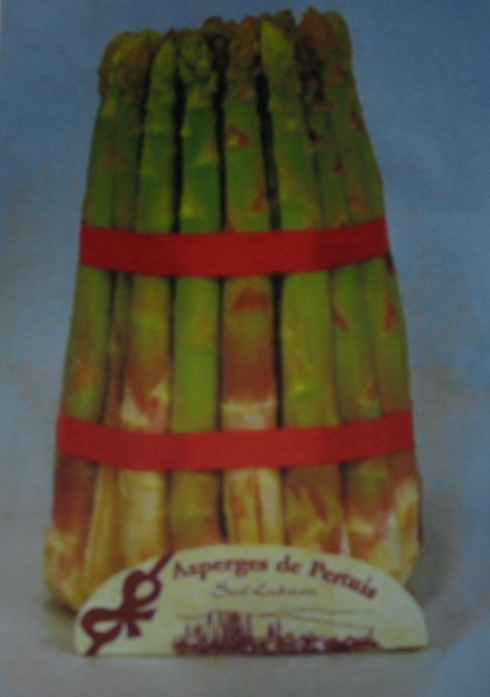 Asperge de Pertuis